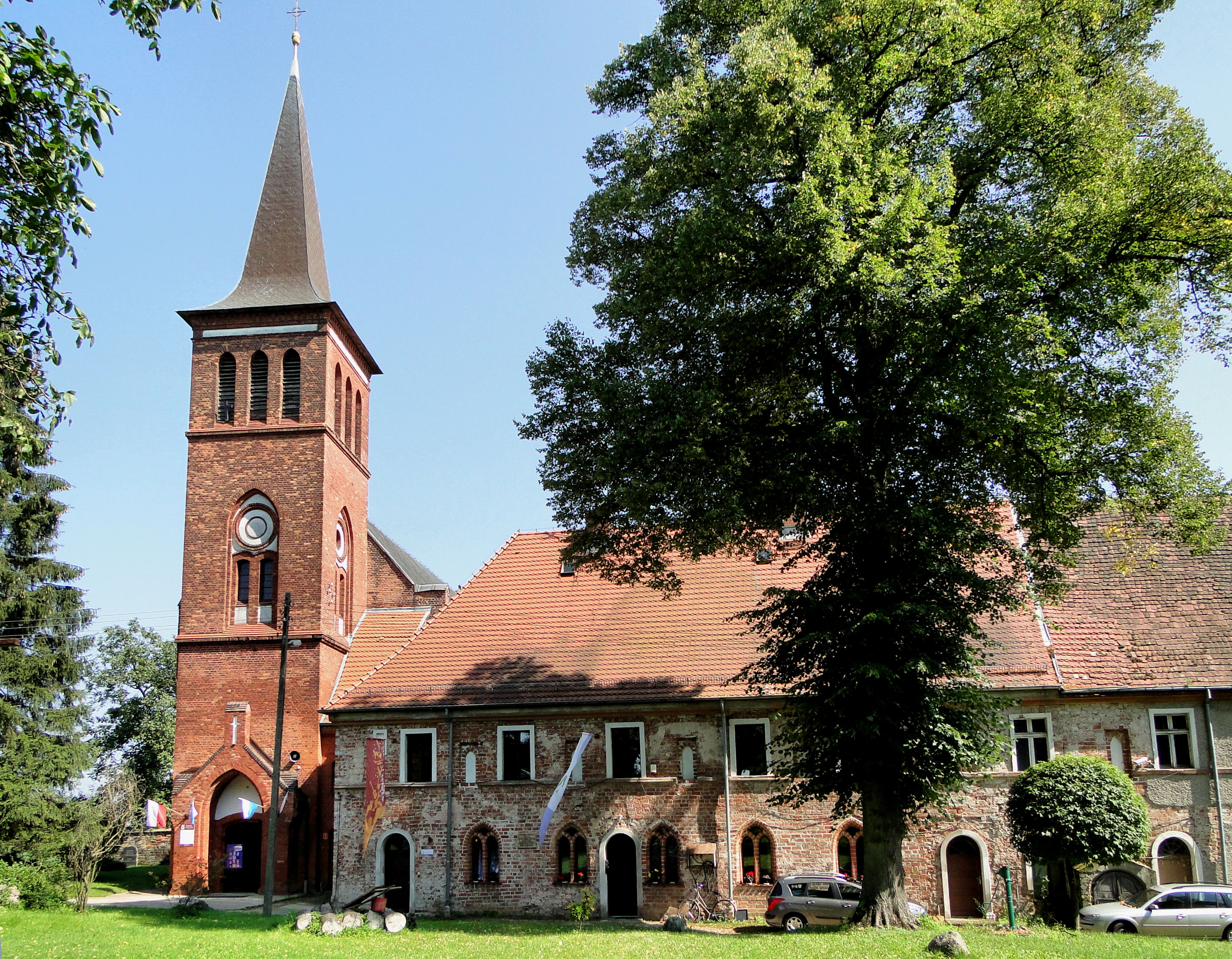 Marianowo - zespół klasztorny cystersów